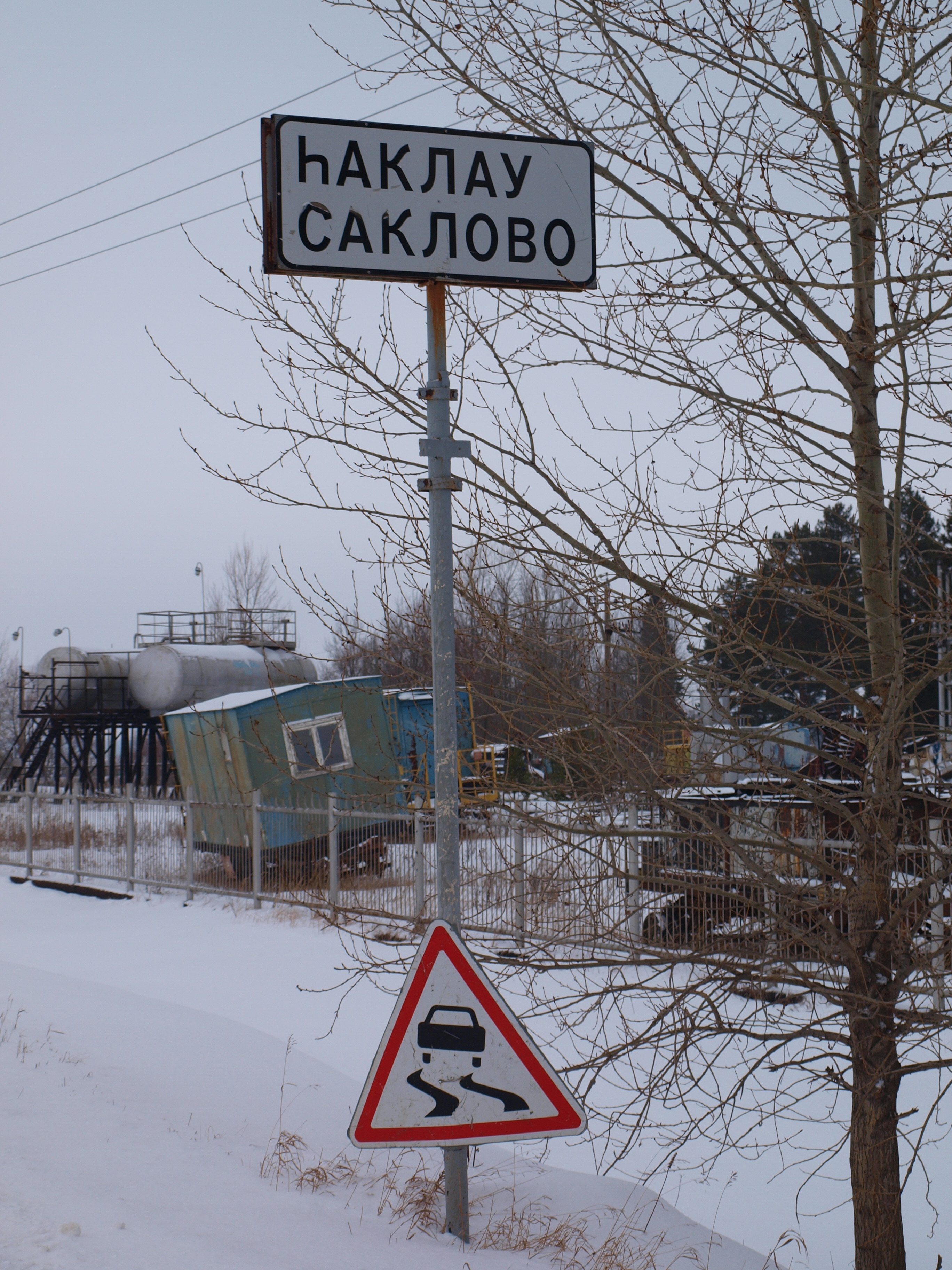 Скалово (Краснокамский район) Знак въезда в село